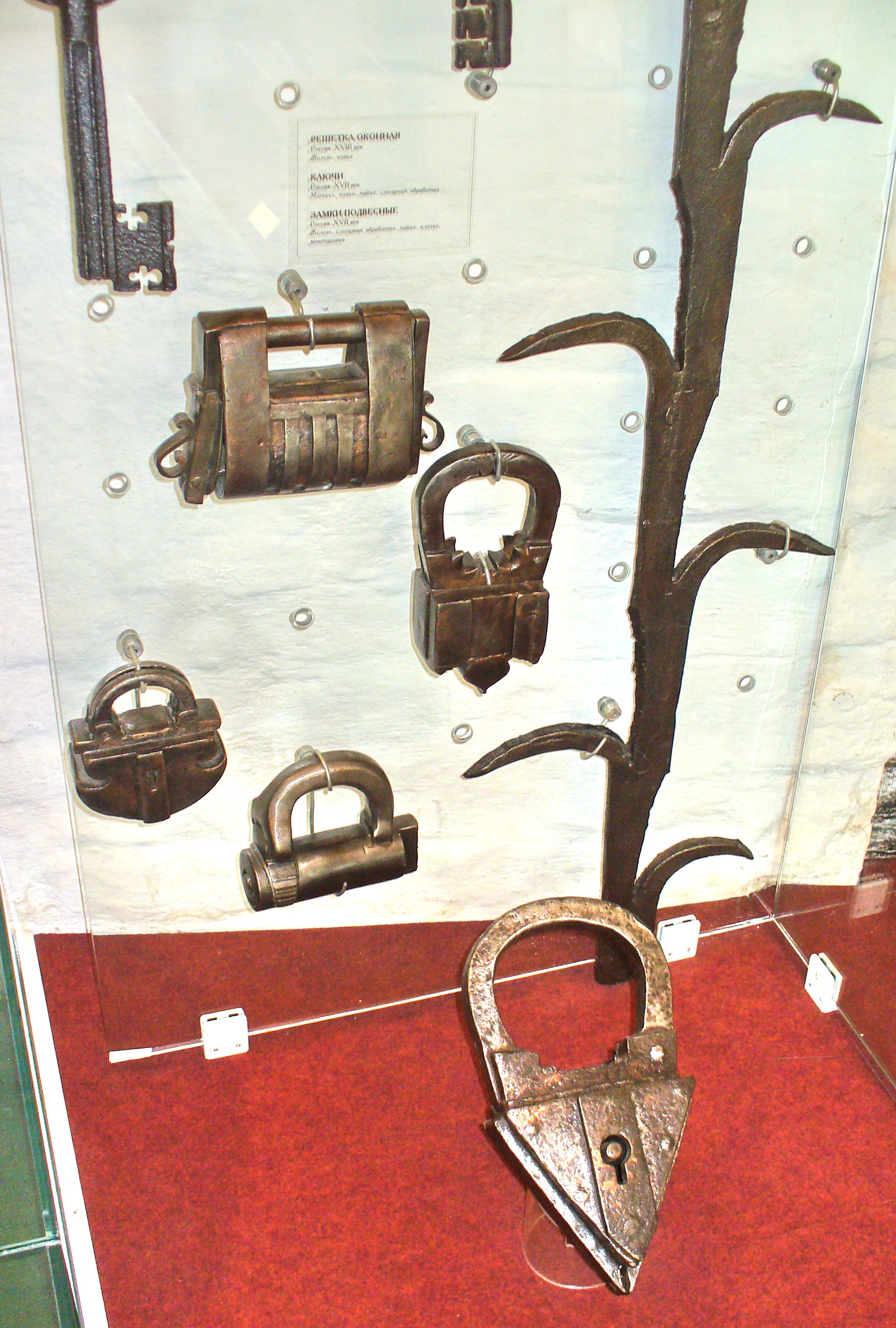 Замки подвесные. Россия, XVII век.